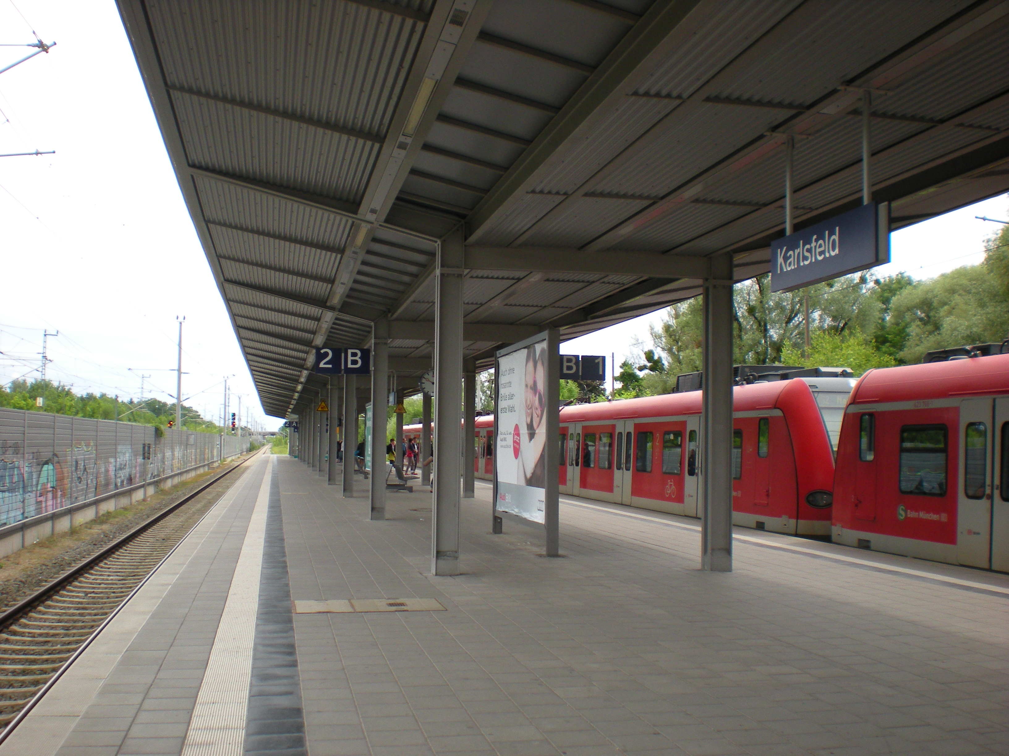 Bahnsteig des S-Bahnhofs München-Karlsfeld